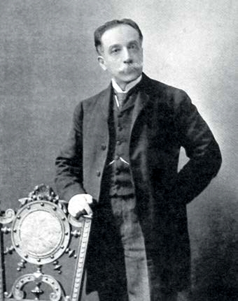 Alejandro Deustua (1849-1945) filósofo, educador y diplomático peruano.